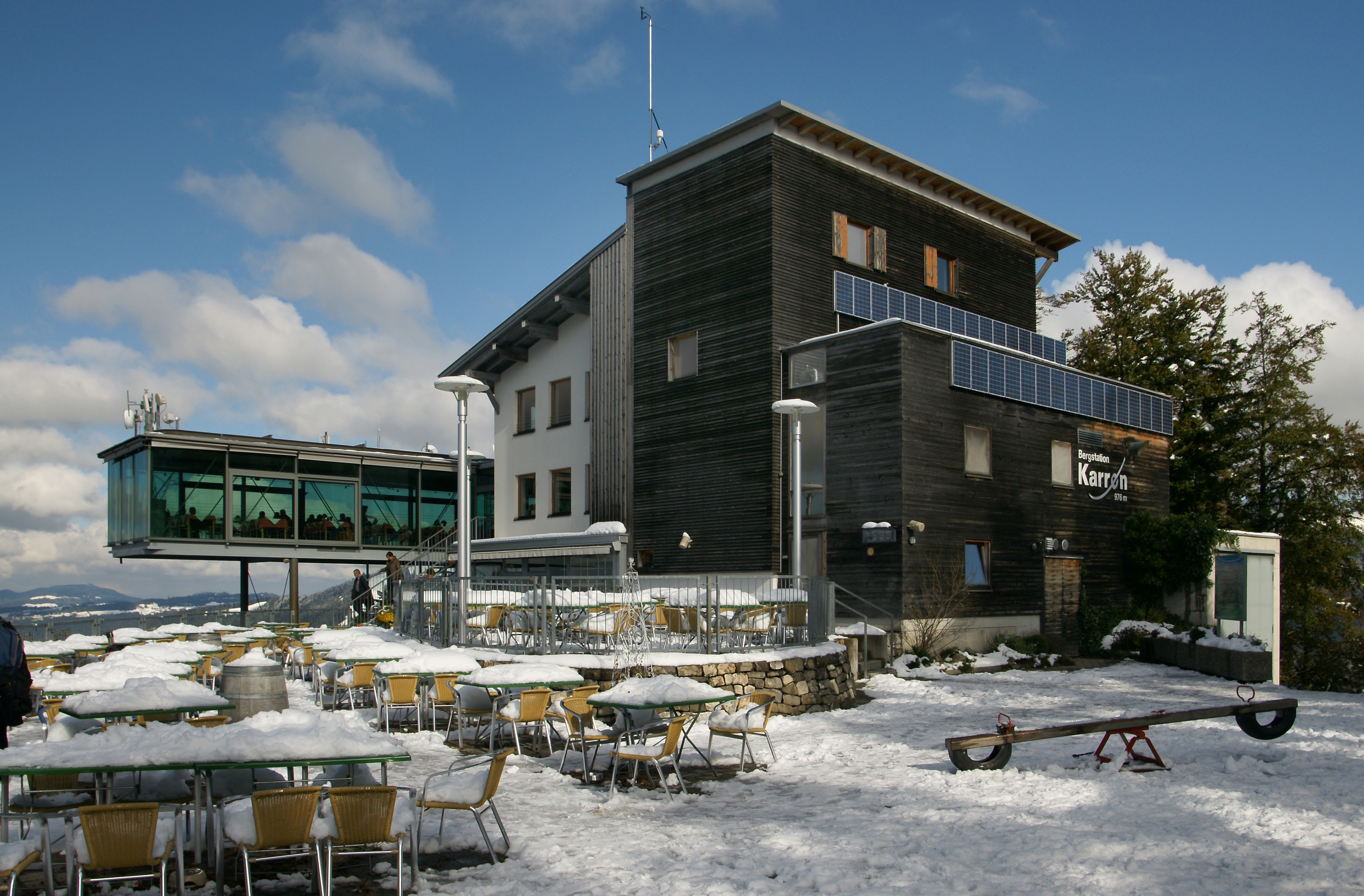 Bergstation und Restaurant Karren in Dornbirn.